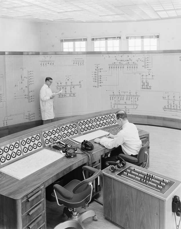 Oslo lysverker, interiør, kontrollrom, Oslo, Solli, Sommerrogata 1963.